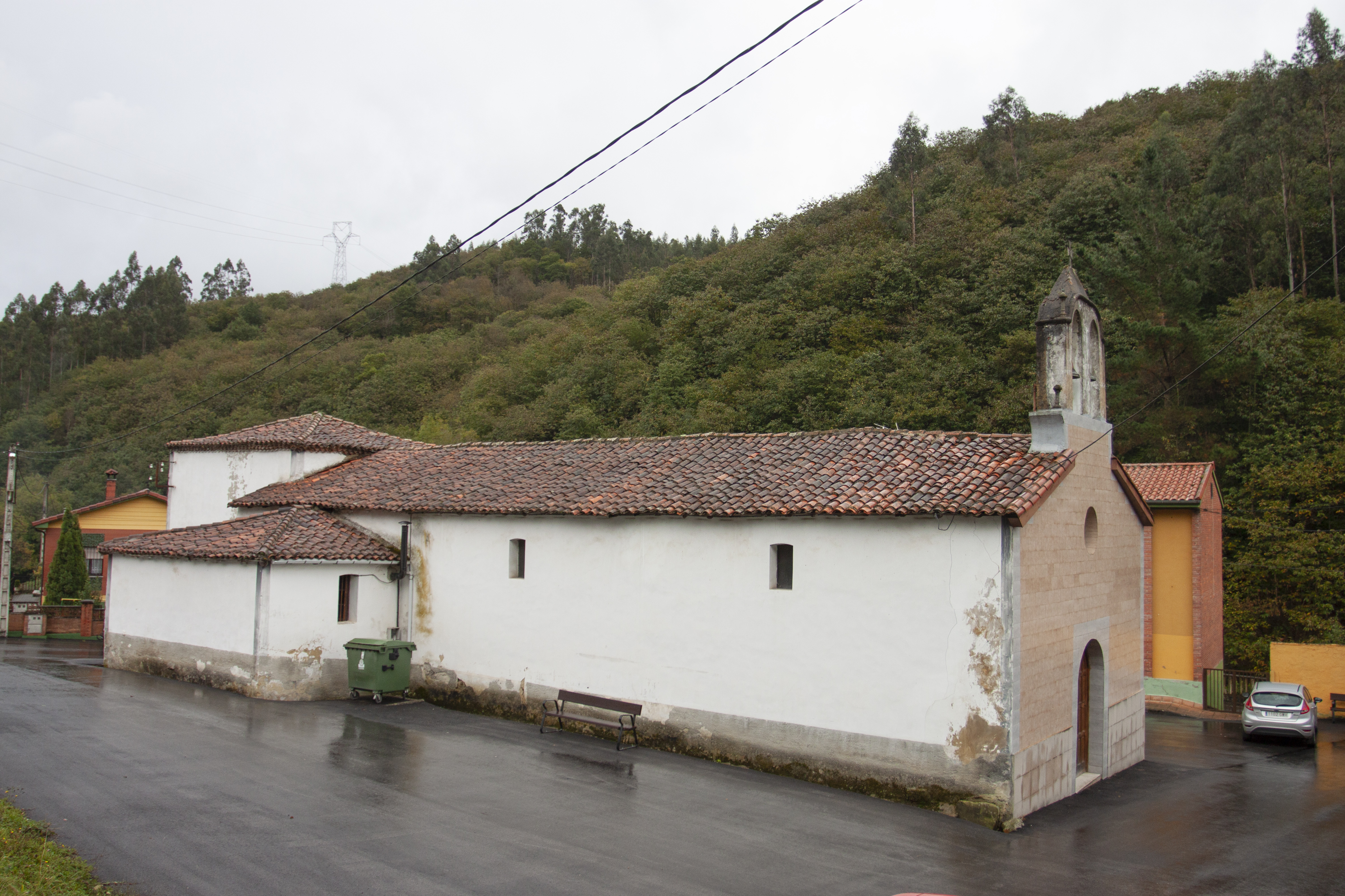 La Venta (Langreo, Asturias)